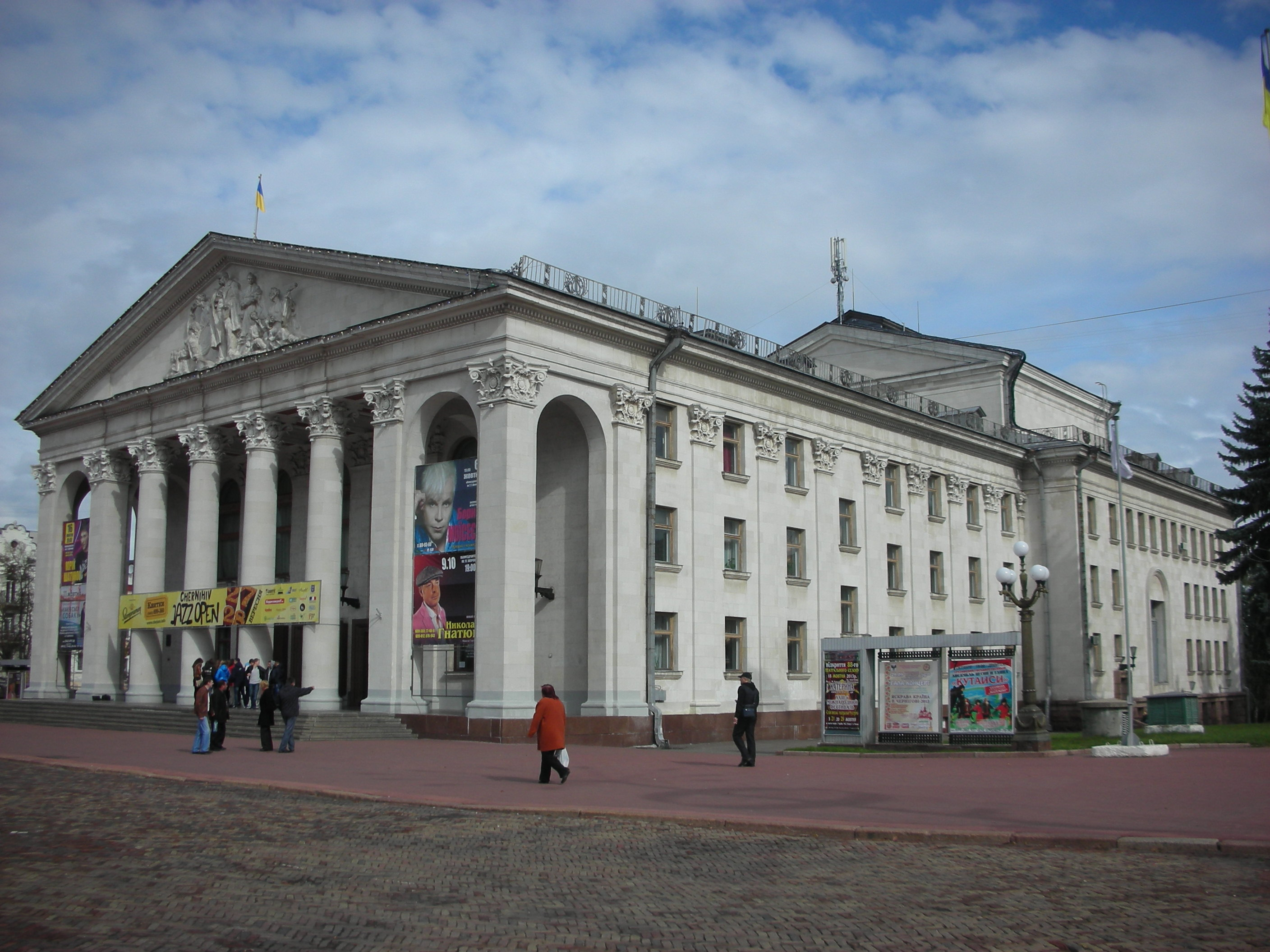 Драматичний театр ім.Т.Г.Шевченка, Чернігів, пл. Красна, 1